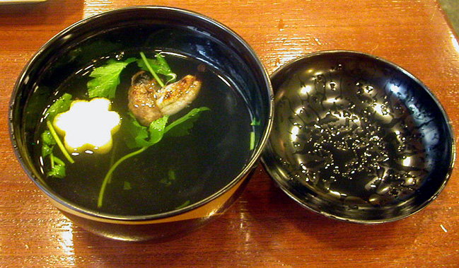 撮影者：小太刀 肝吸い。ウナギの肝吸いは、よくウナギ料理に添えられる吸い物です。